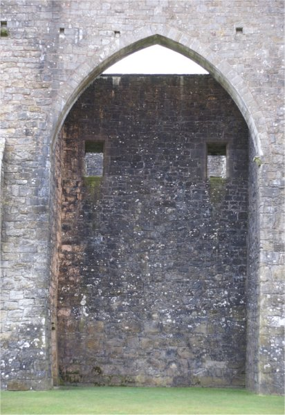 Hermitage Castle, Scotland